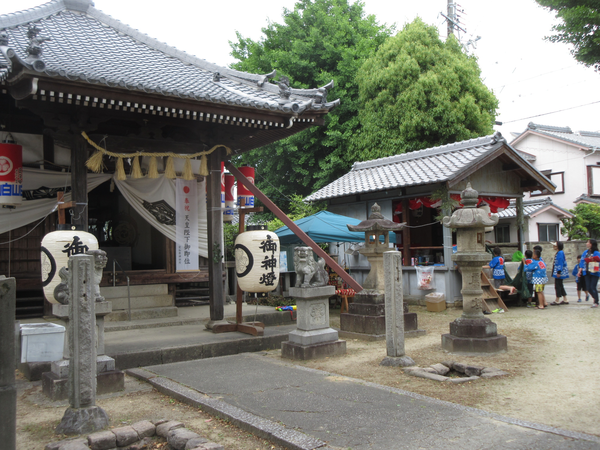 白山神社（岡崎市魚町）